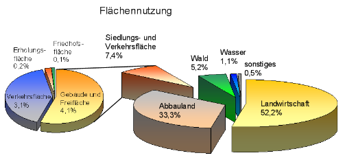 Verteilung der Gemeindefläche (Elstertrebnitz (Deutschland)) nach deren Nutzung